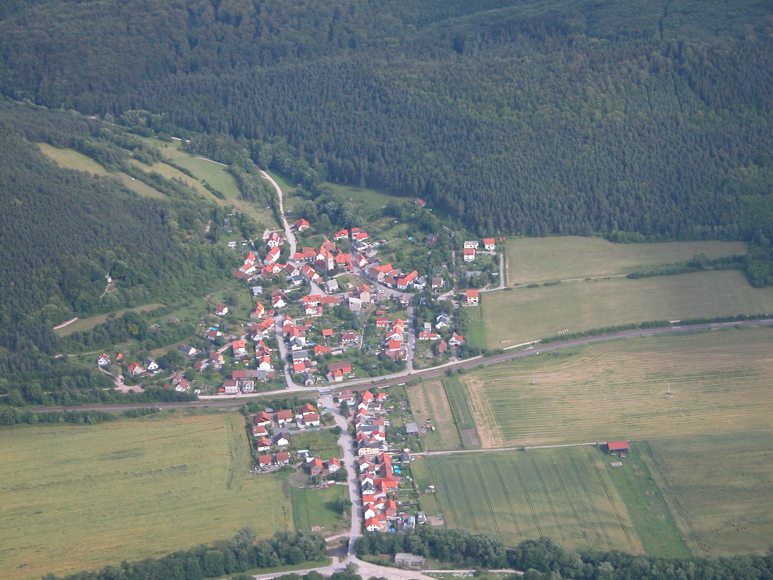 Luftbild von Siegelbach (IK)